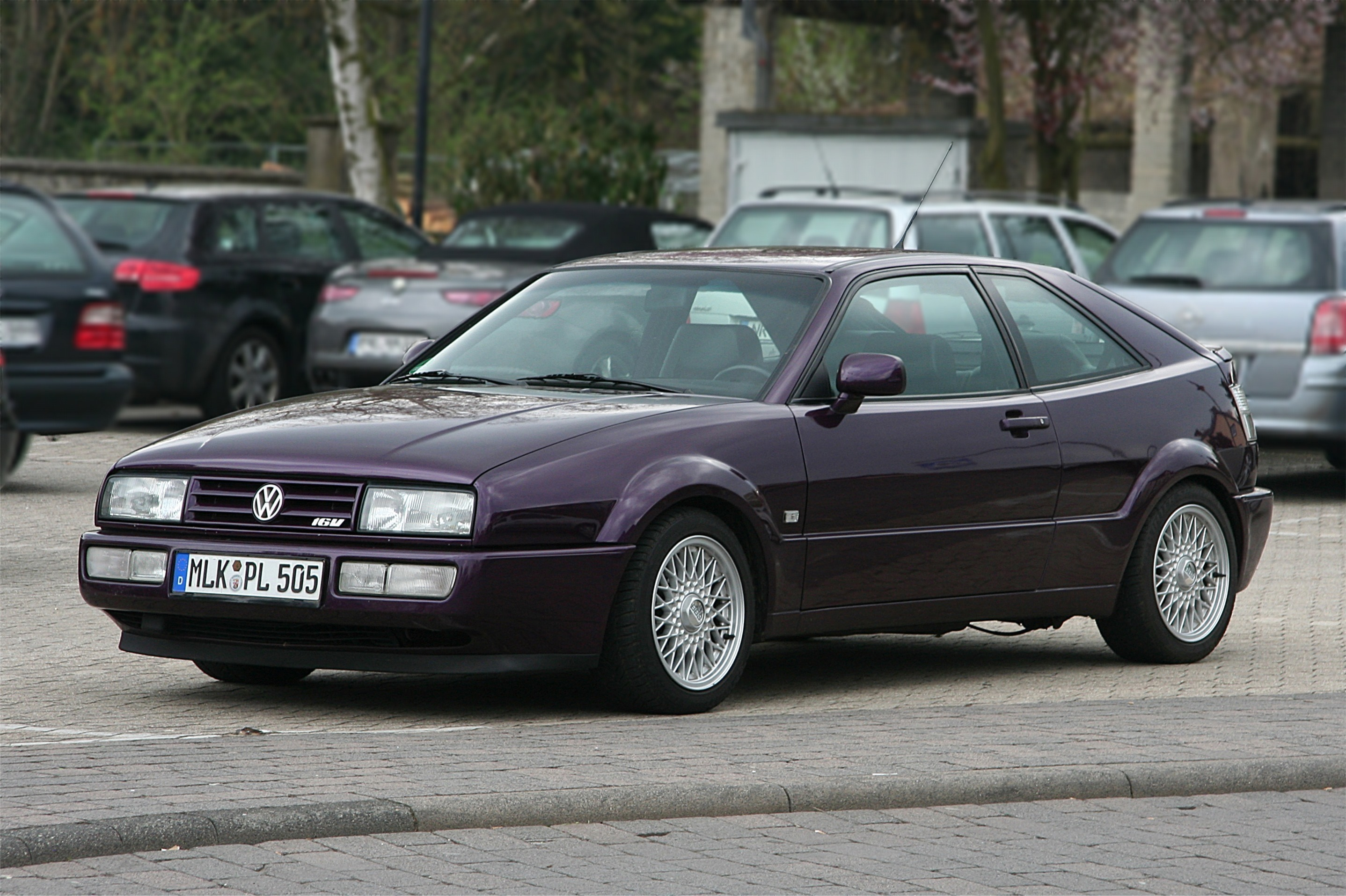 VW Corrado 16V; Bauzeit dieses Modells: August 1991 bis Juli 1994 (Fantasiekennzeichen)